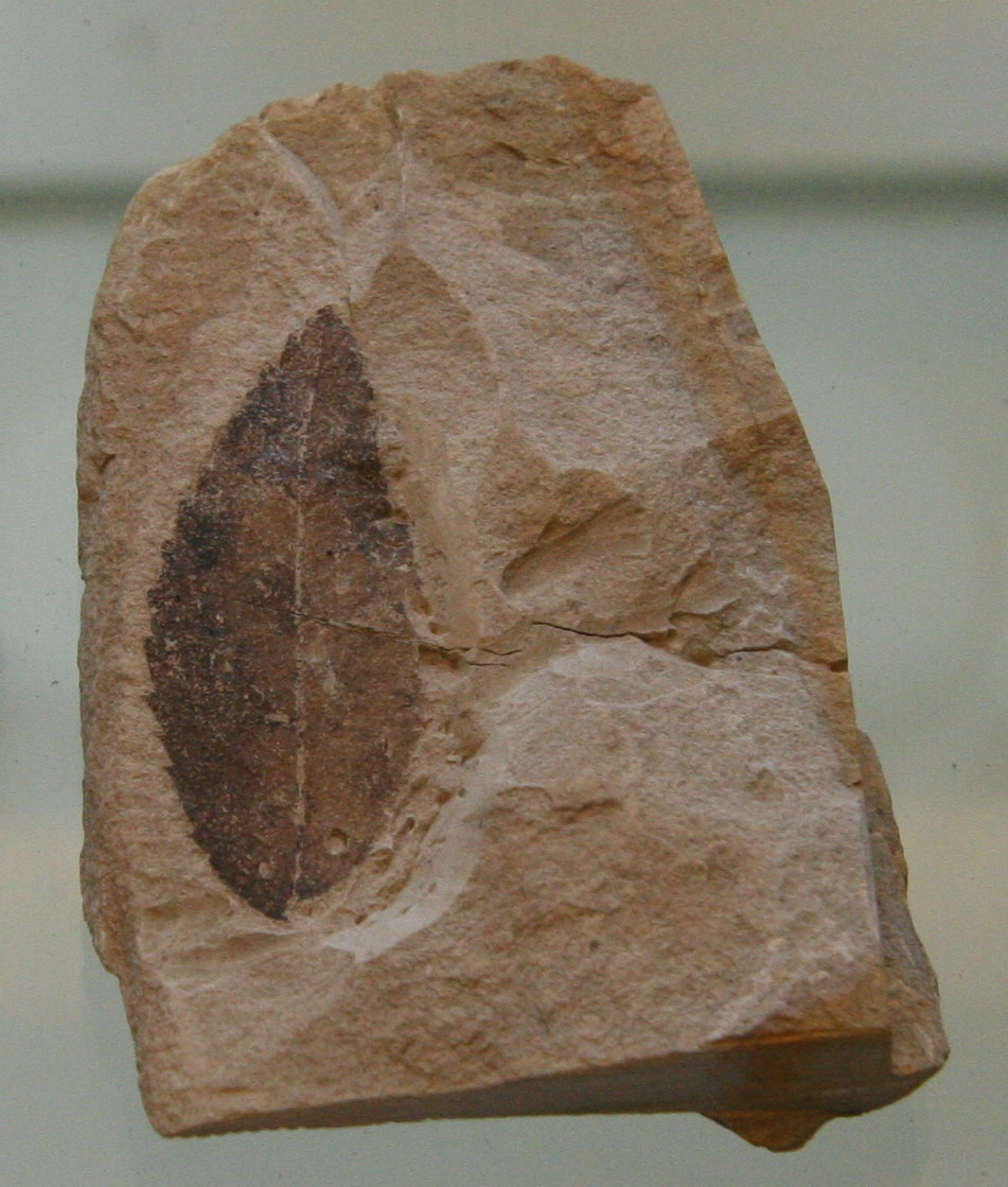 fossiles Blatt von Rosa lignitum im Botanischen Garten Dresden